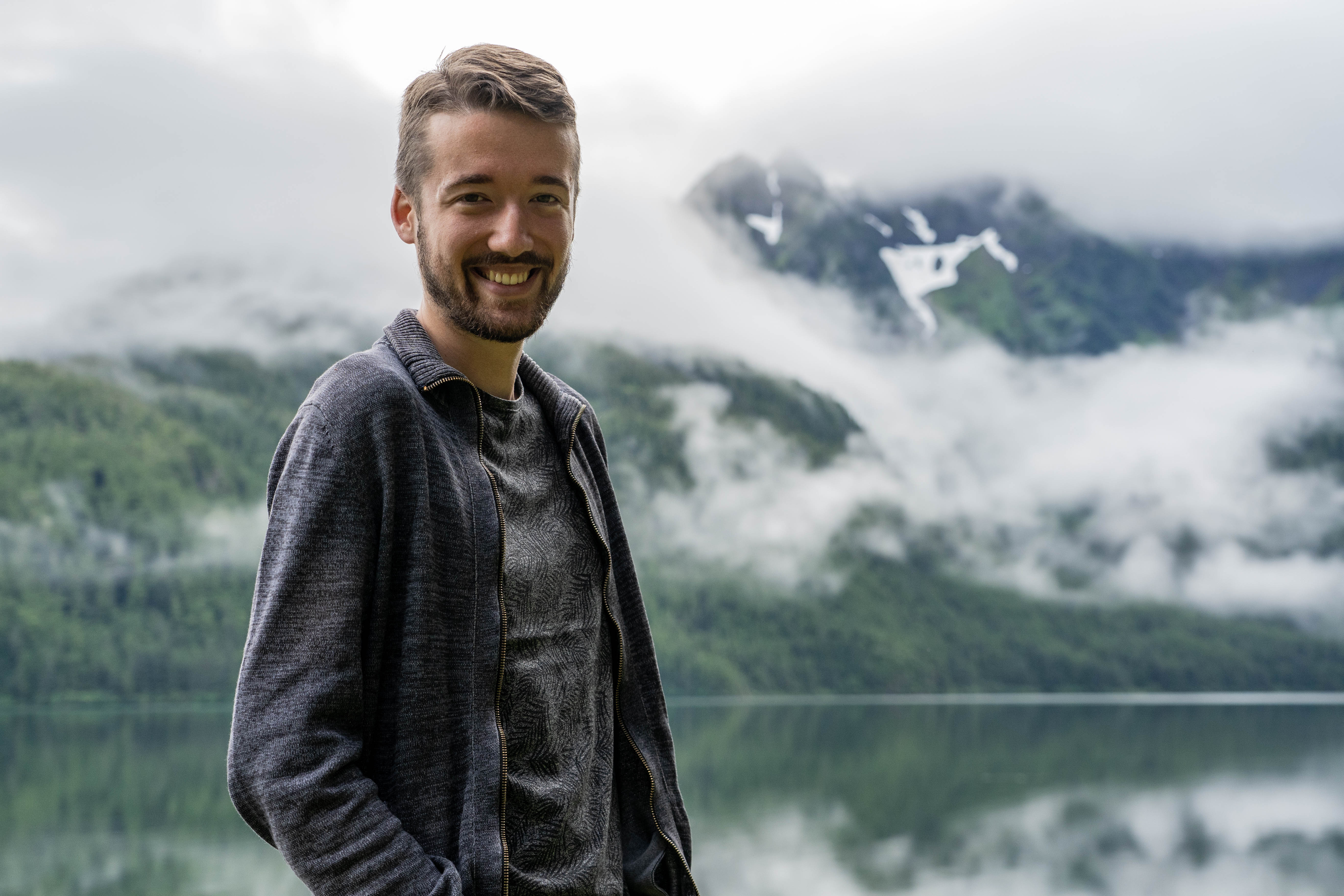 Guillaume Leduey devant le lac Eyak (Cordova, Alaska)